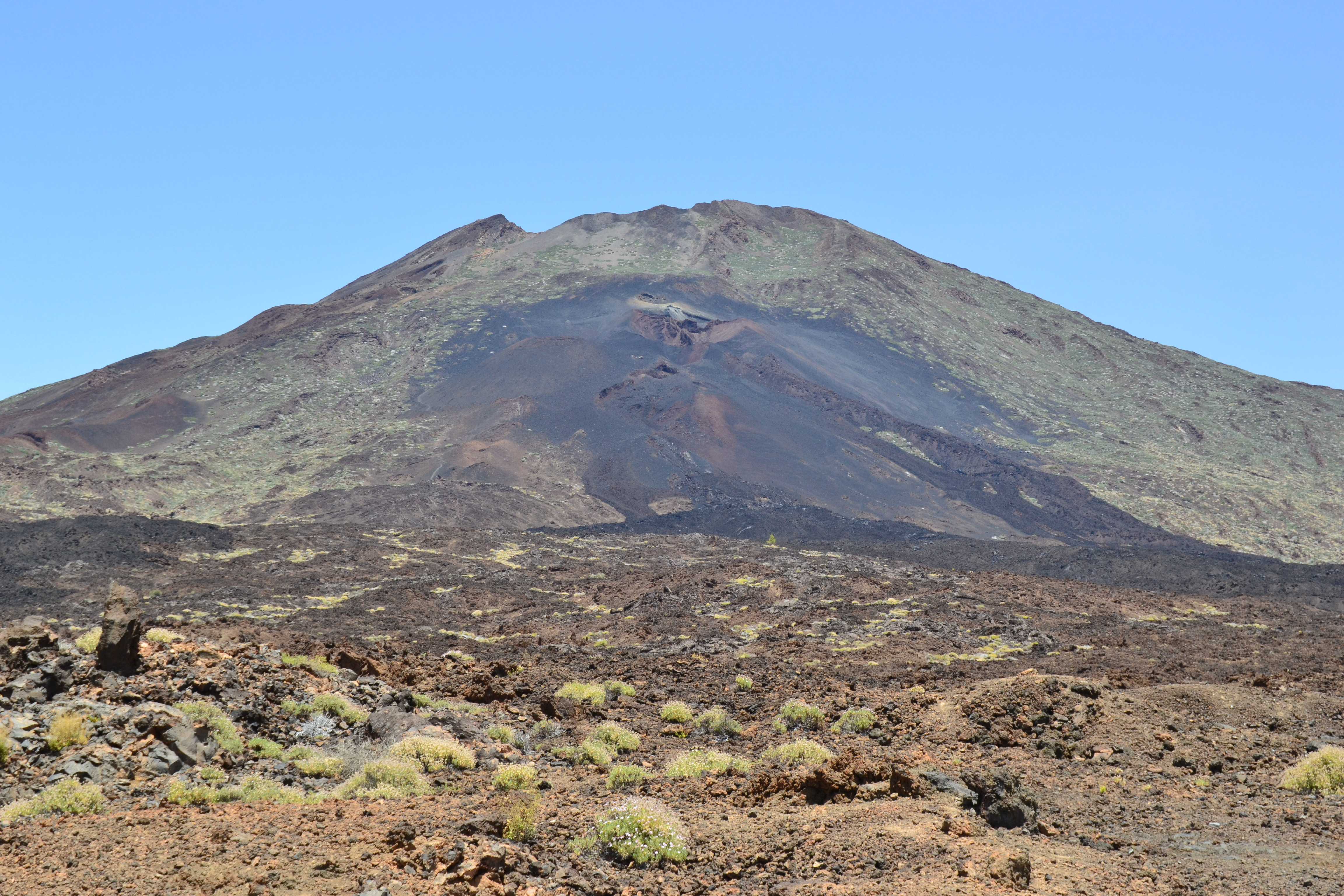 Parc national du Teide, le Pico Viejo, Tenerife, îles Canaries, Espagne.